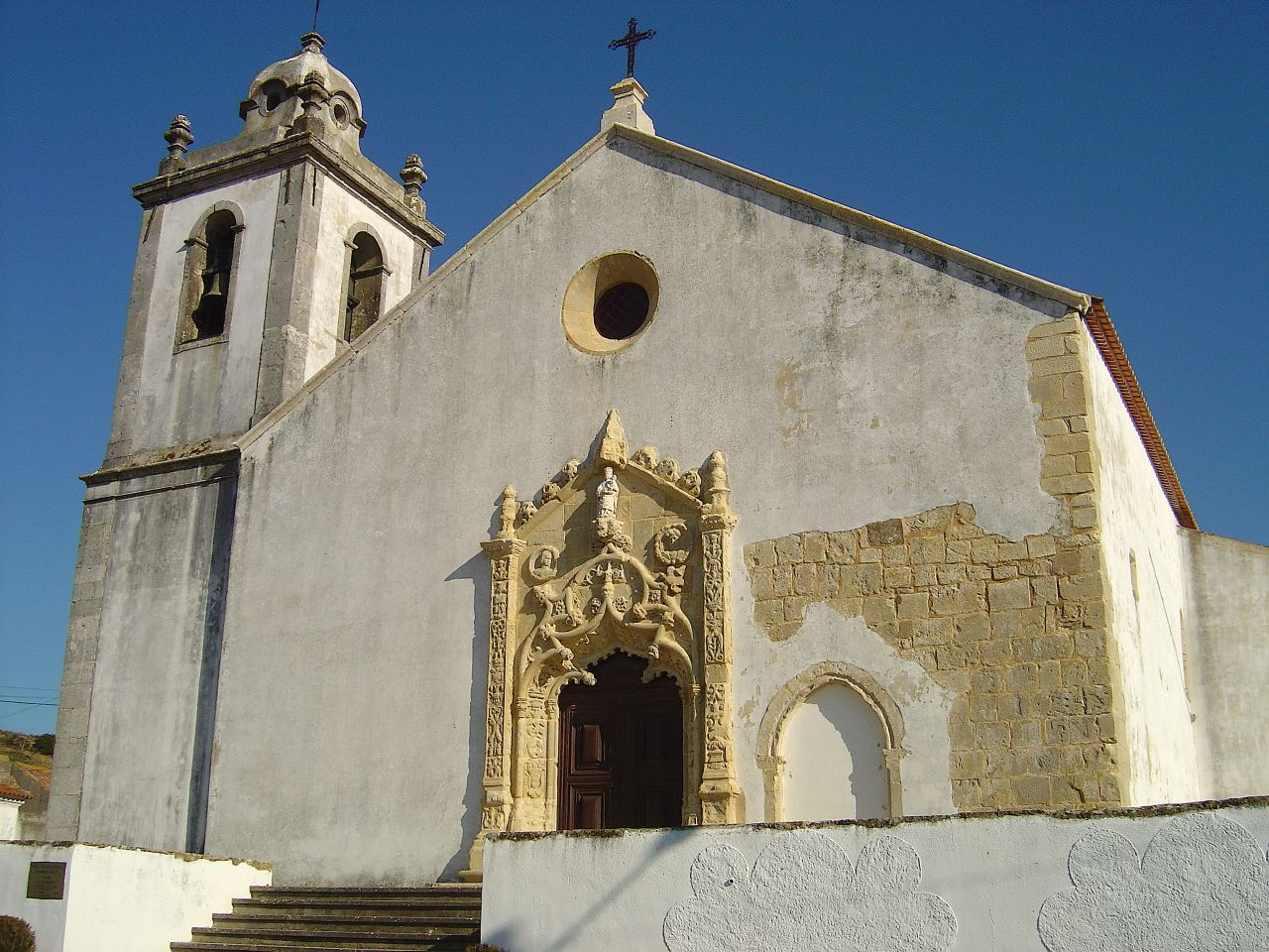 Igreja de Sto. Quintino - Sobral de Mte. Agraço